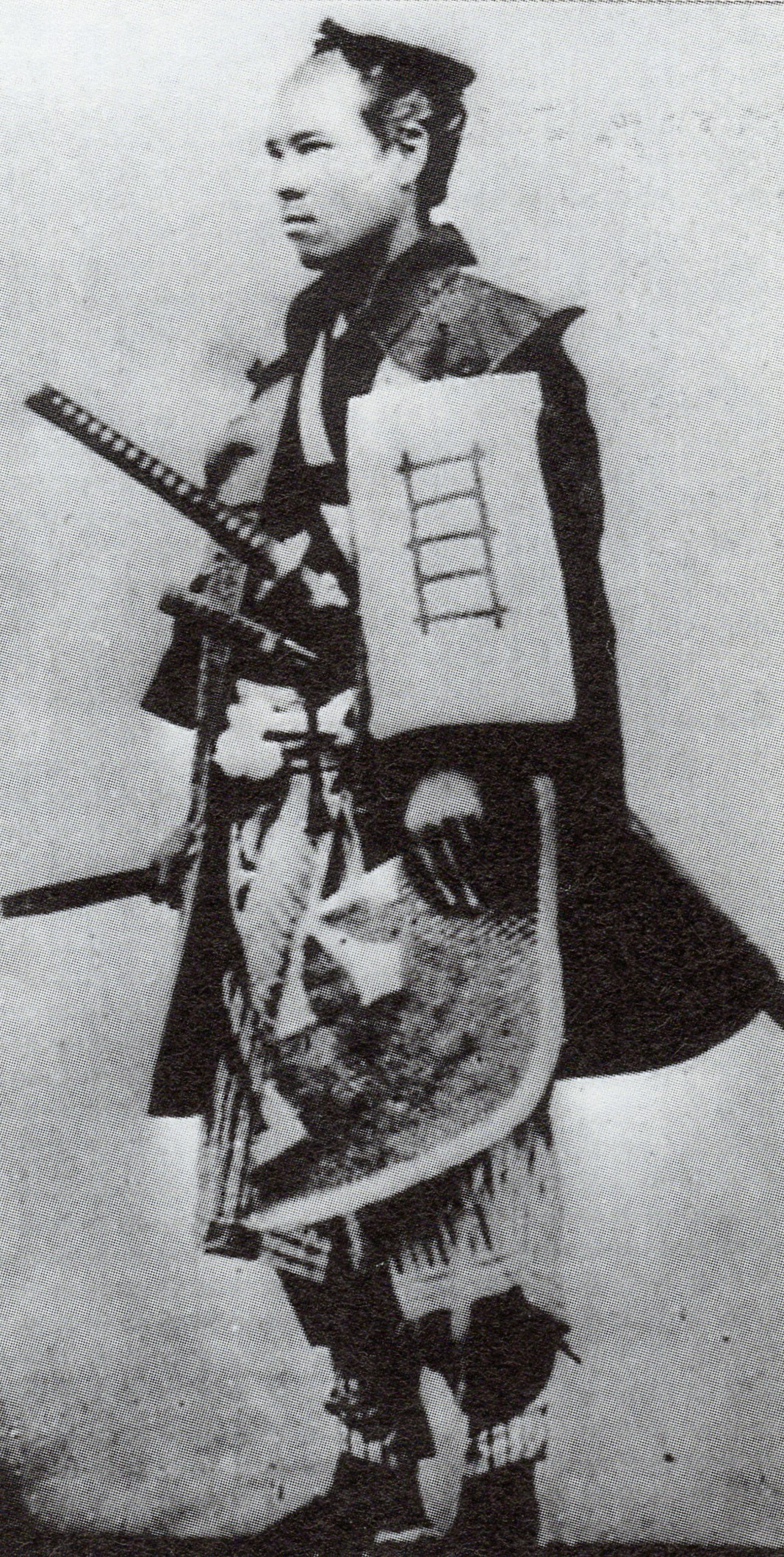 二見虎三郎の肖像写真。